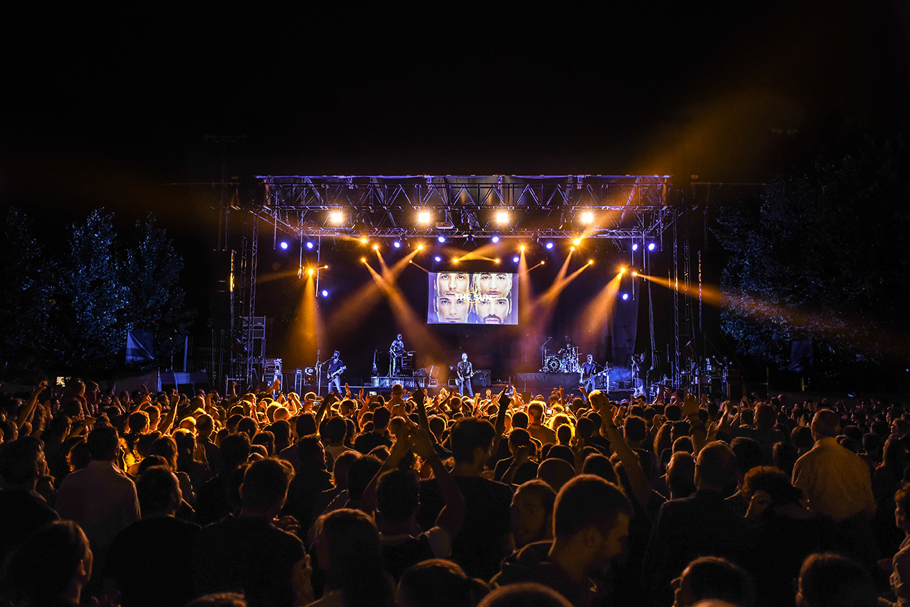 Performance live The Sun @ Verona (VR)